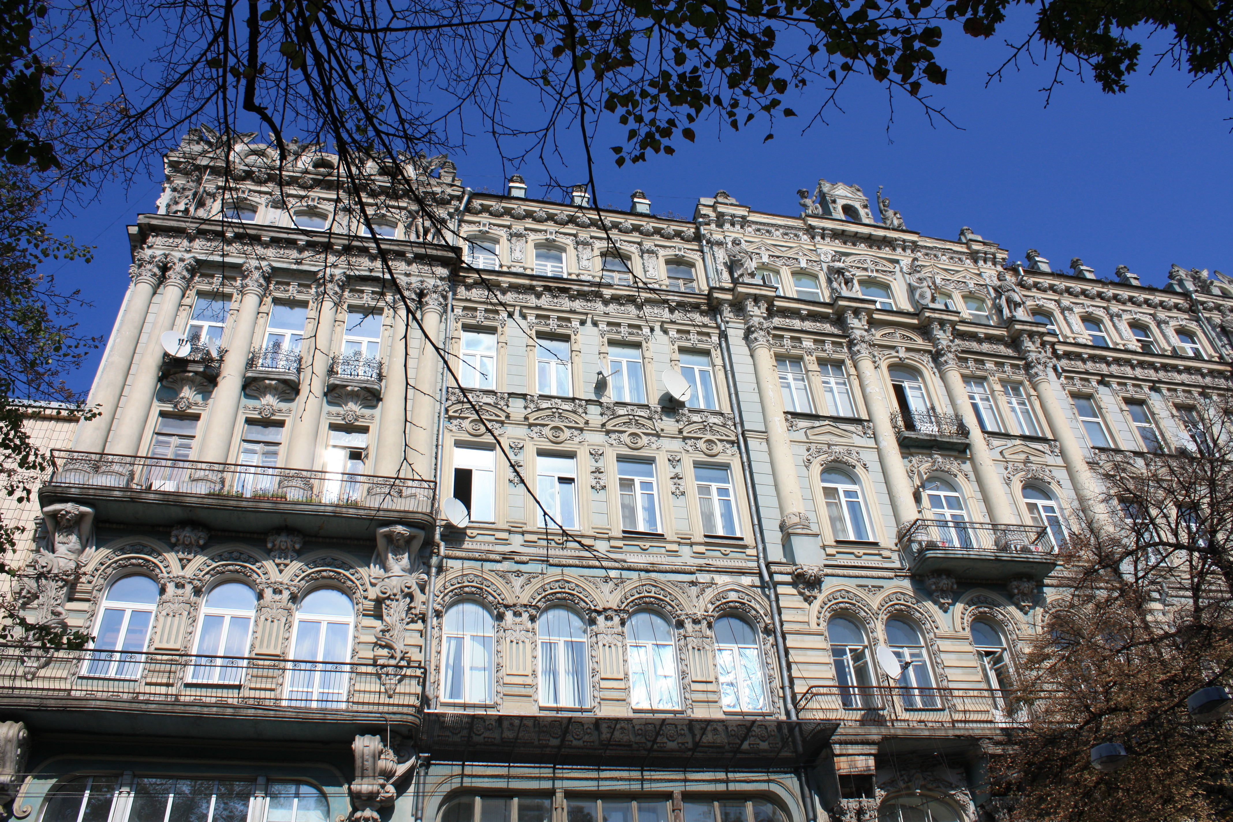 Київ, вул. Архітектора Городецького, 9